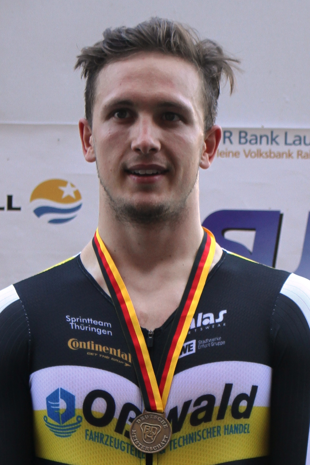 Marc Jurczyk, deutscher Radsportler